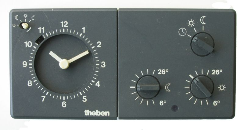 Raumtemperaturregler Theben, 1980er Jahre